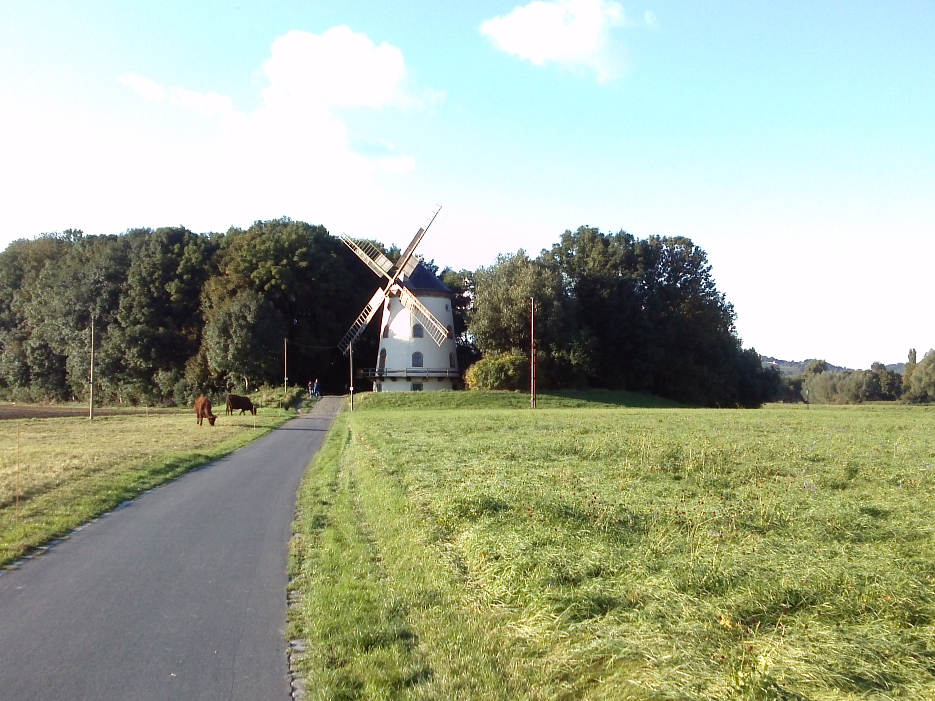 Gohliser Windmühle am Elberadweg